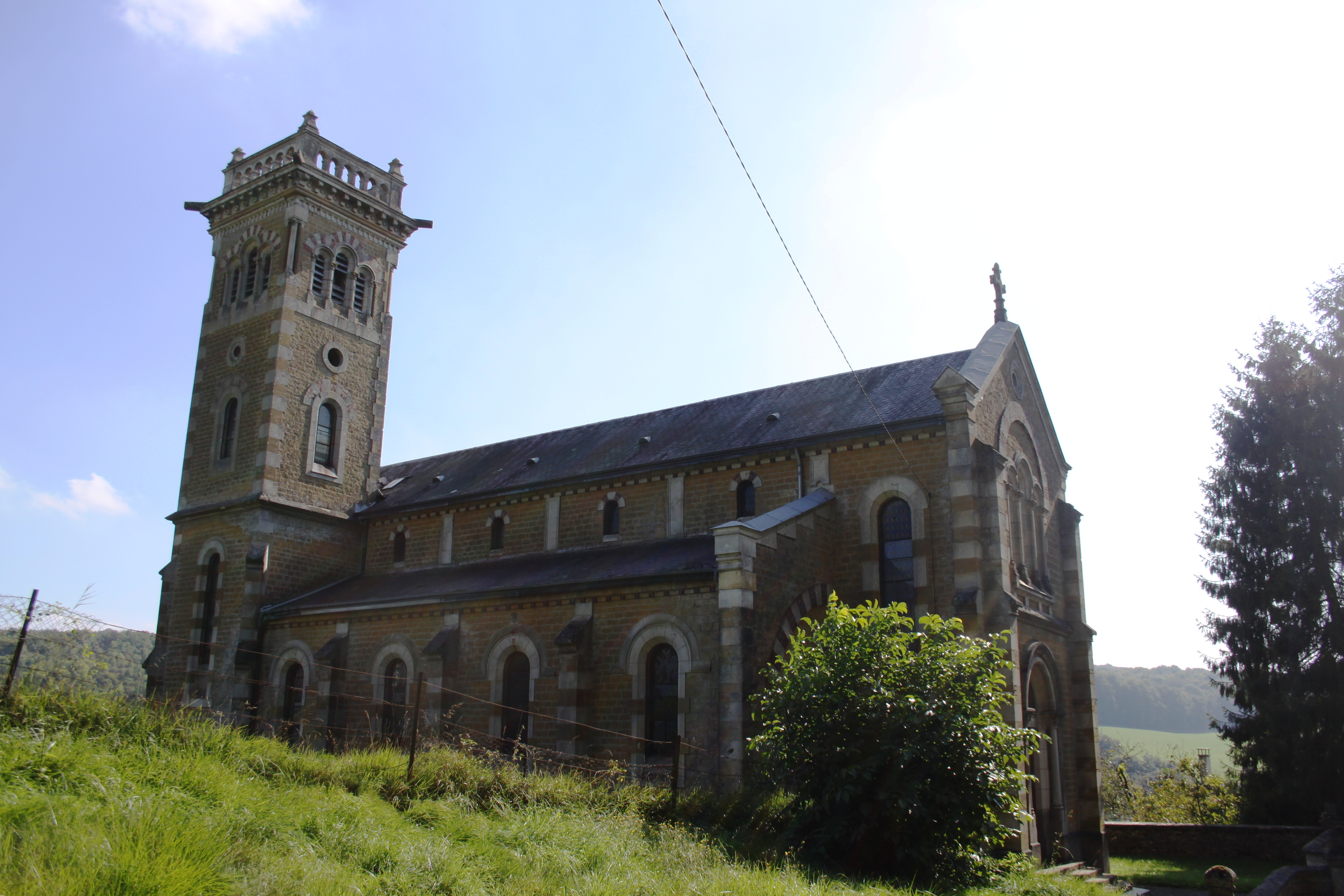 Village Ardennais